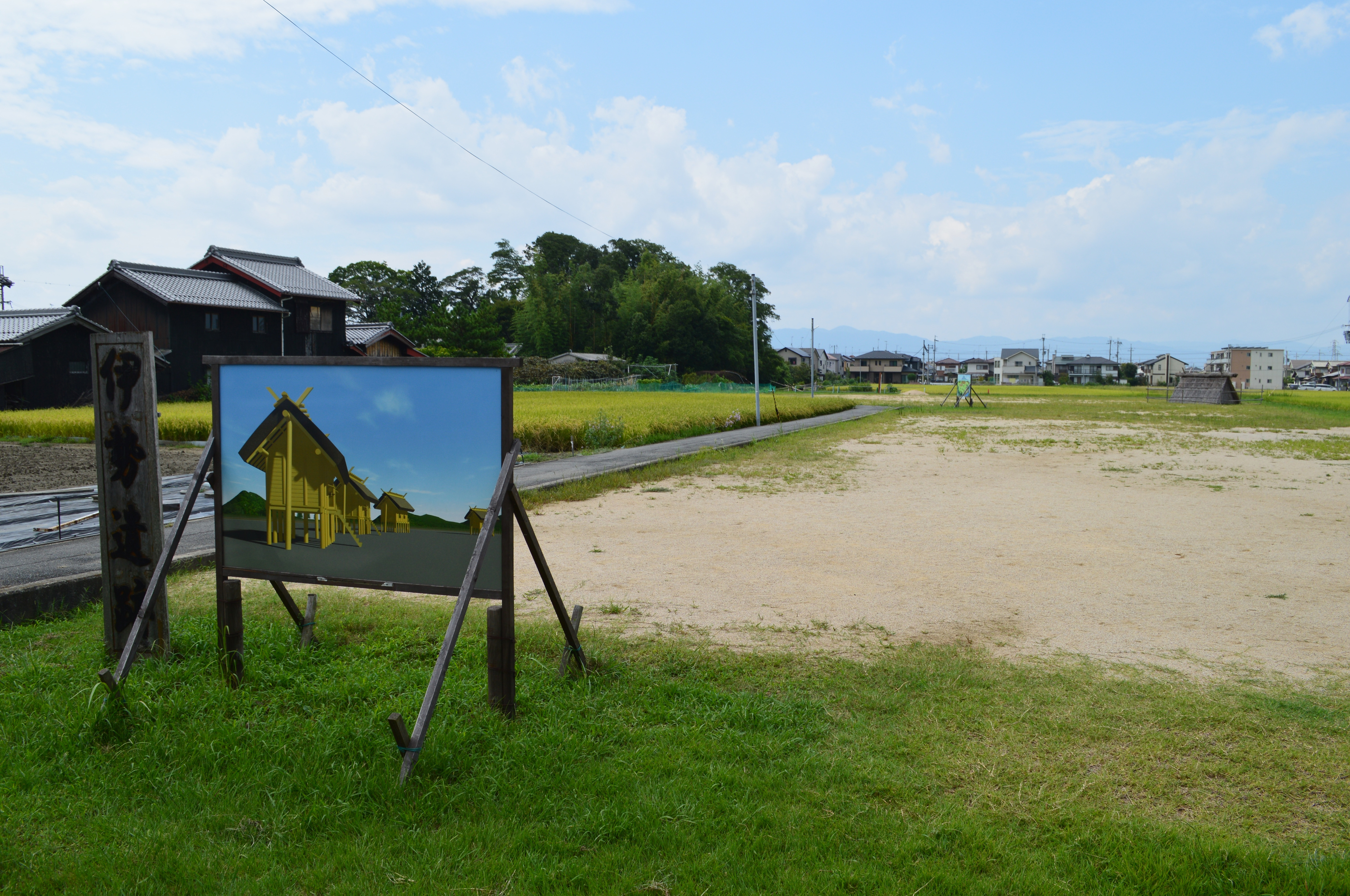 伊勢遺跡 (守山市) 概観